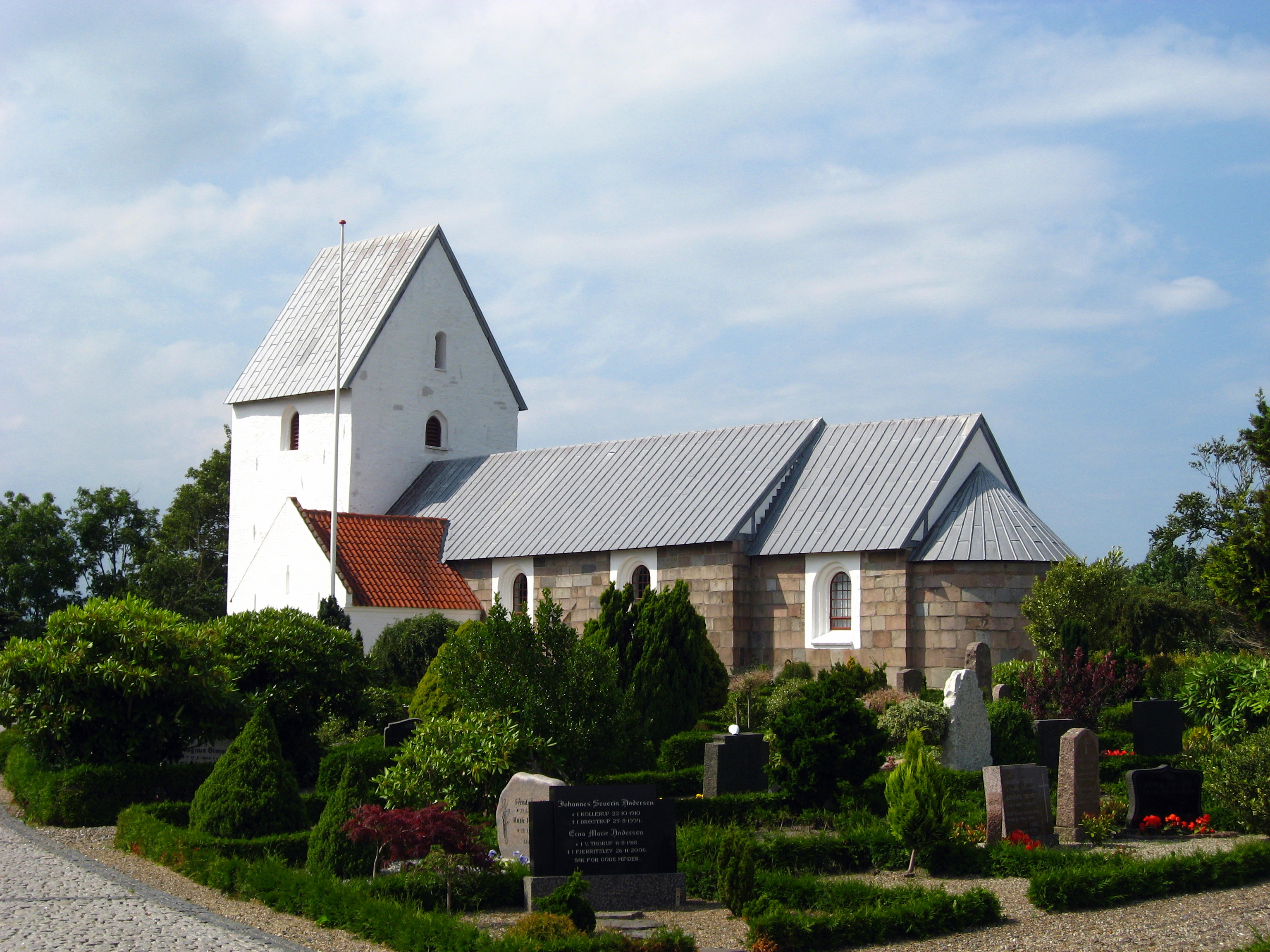 Gøttrup Kirke, Jammerbugt Kommune